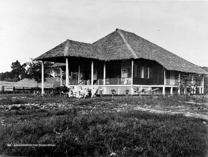 Foto. Huis van de administrateur op de tabaksplantage Namoe-Oekoer.